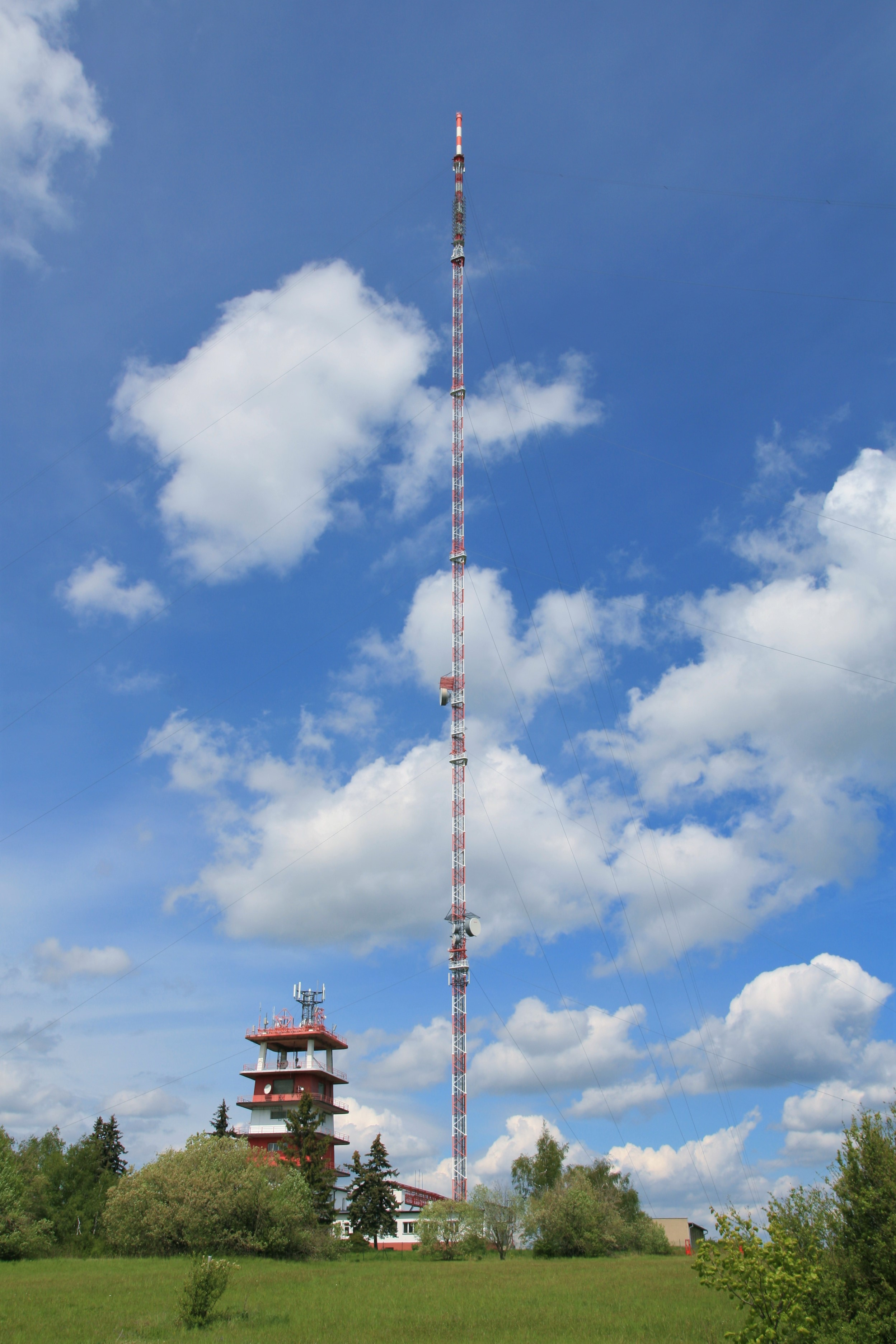 Obec Krásensko v okrese Vyškov, televizní vysílač Kojál při rozcestí nad vsí. Celkový pohled z jihovýchodu od autobusové zastávky.